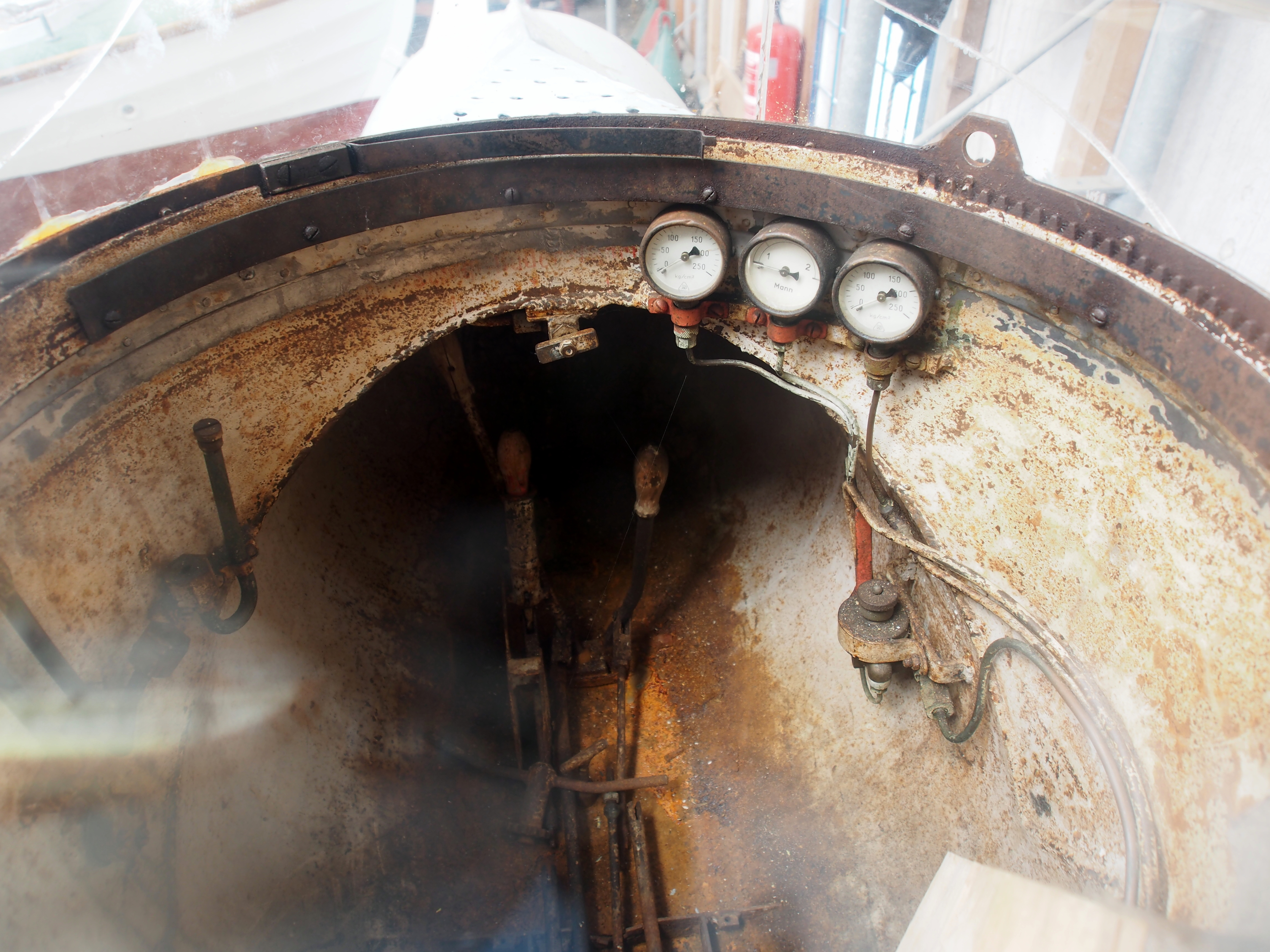 Photographed at Aalborg Søfarts- og Marinemuseum, Denmark.